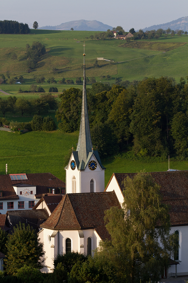 Kirche von Menzingen